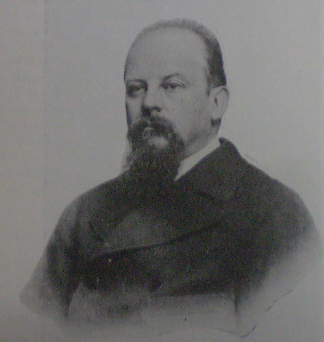 Tiburcio Benegas